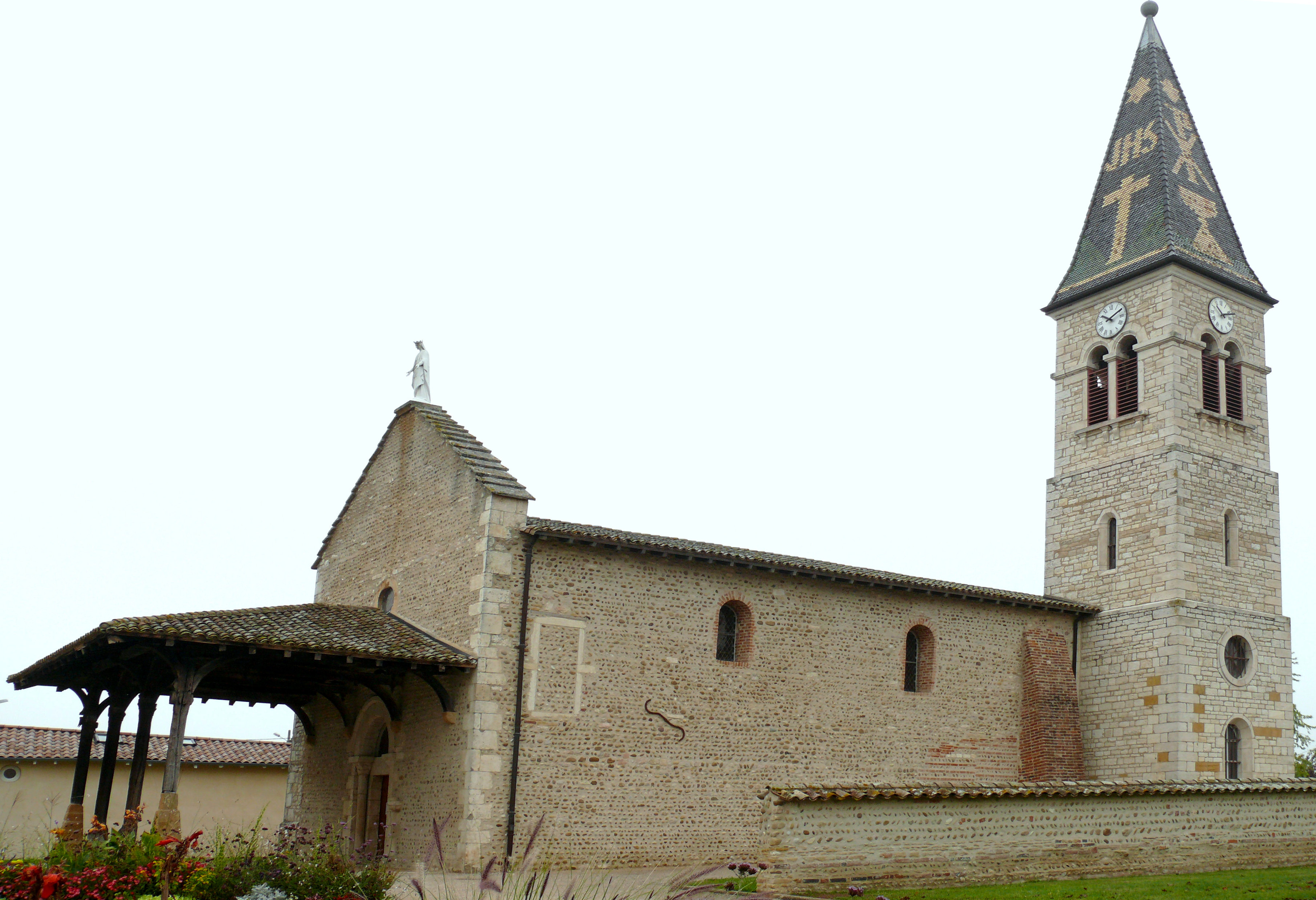 Savigneux (Ain) - Eglise Saint-Laurent